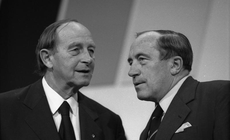 26. Bundesparteitag der CDU in der Friedrich-Ebert-Halle in Ludwigshafen 23.-25.10.1978